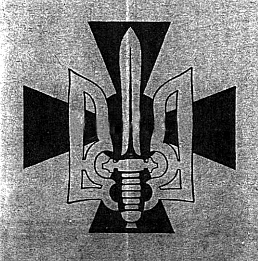 Емблема Українського Фашистівського Здвигу.